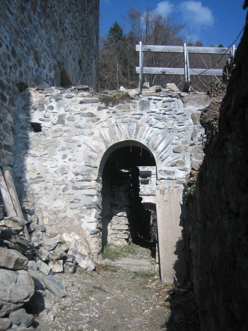 Aspermont Nordtor